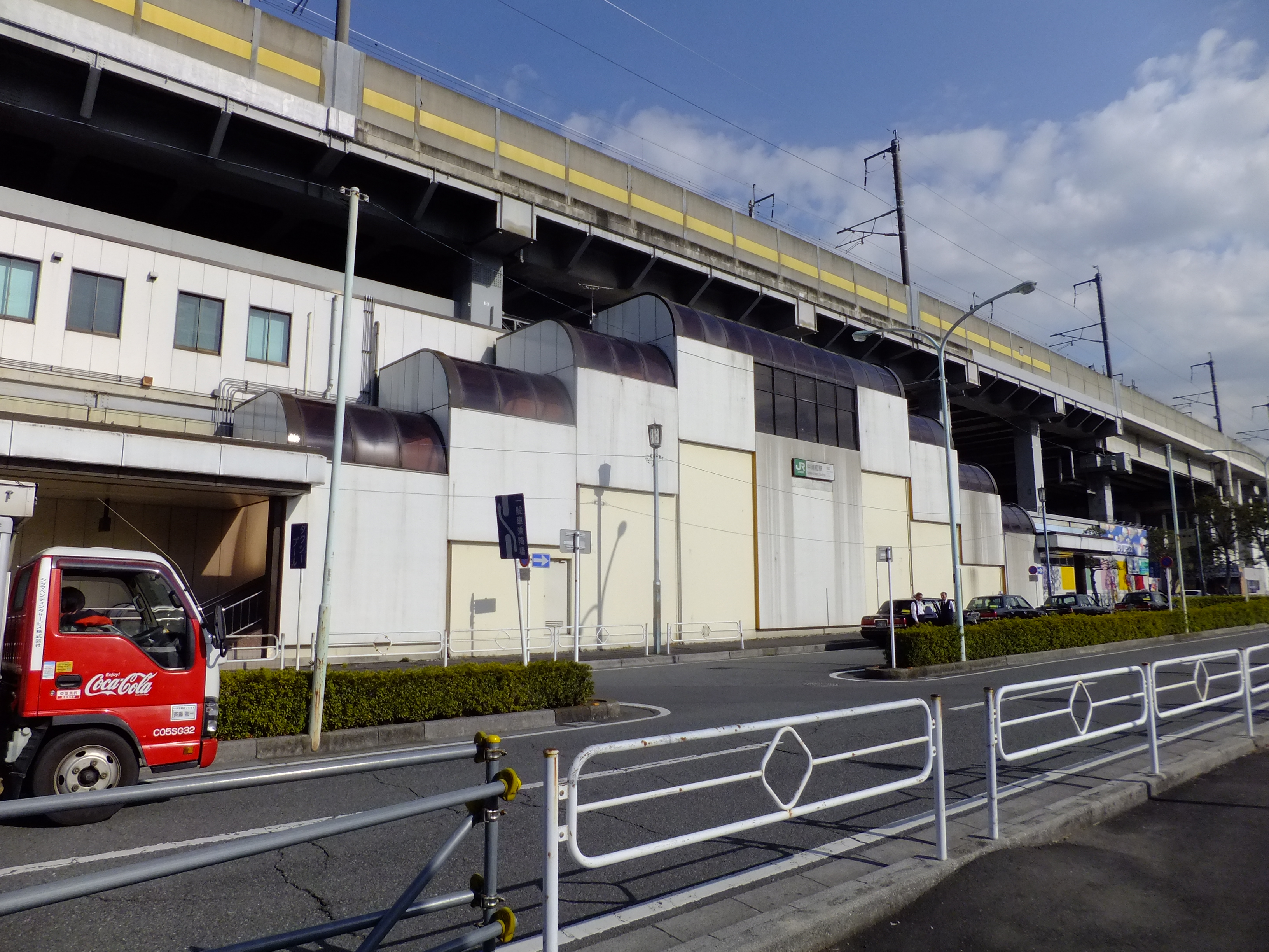 埼京線・中浦和駅西口